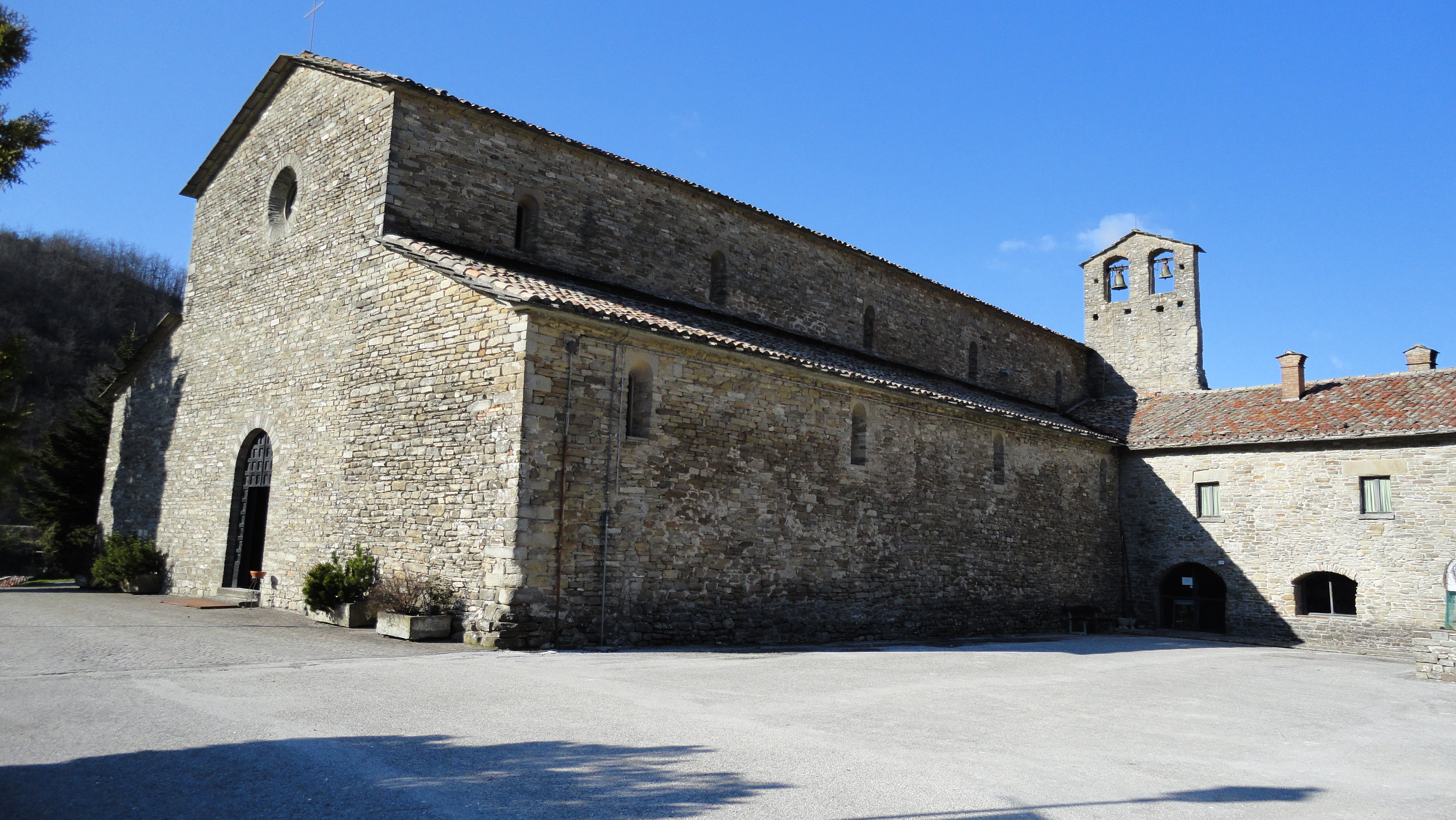 Trattasi di fotografia dell'Abbazia di San Michele di Lamoli, scattata da me nella data suindicata